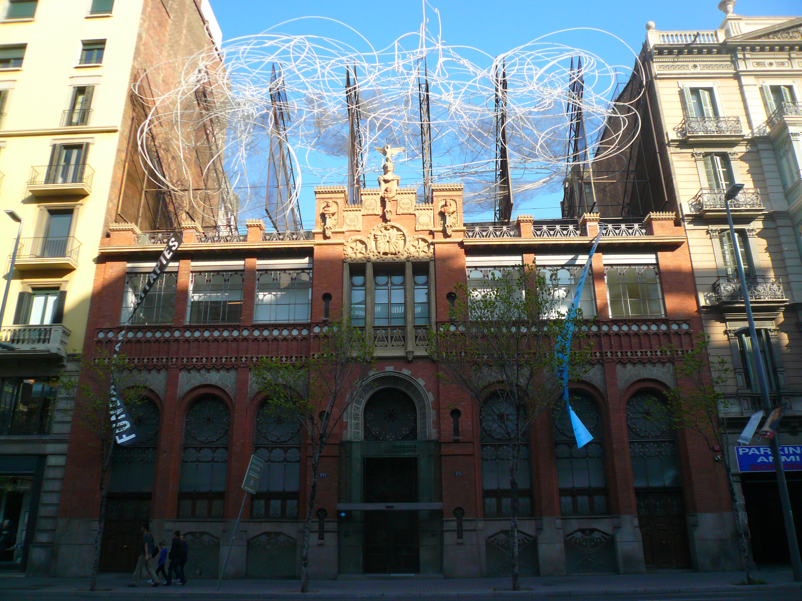 Núvol i cadira. C. Aragó, 255, Fundació Antoni Tàpies (Barcelona). Escultor: Antoni TàpiesArquitectes: Lluís Domènech i Girbau, Roser Amadó. Material: acer inoxidable, malla metàl·lica, alumini. 1990. 69″ N, 2° 09′ 49.5″ E